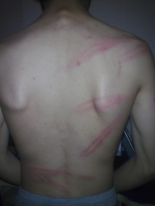 آثار باتوم و شلاق بر فردی به نام امیر م. (نام خانوادگی بخاطر مسائل امنتی مختصر شده) که در شامگاه روز دوشنبه 24 خرداد 1388 در میدان ولیعصر مورد ضرب و شتم به گفته خودش سه نفر با باتوم و یک نفر با شلاق قرار گرفته است. اجازه انتشار تصویر توسط پدید آورنده اثر داده شده است.